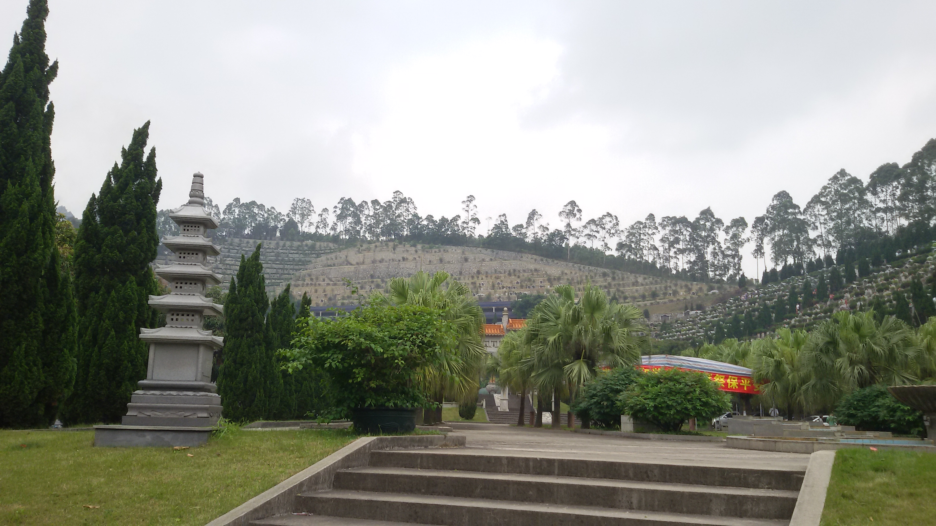 粵語: 廣東華夏永久陵園